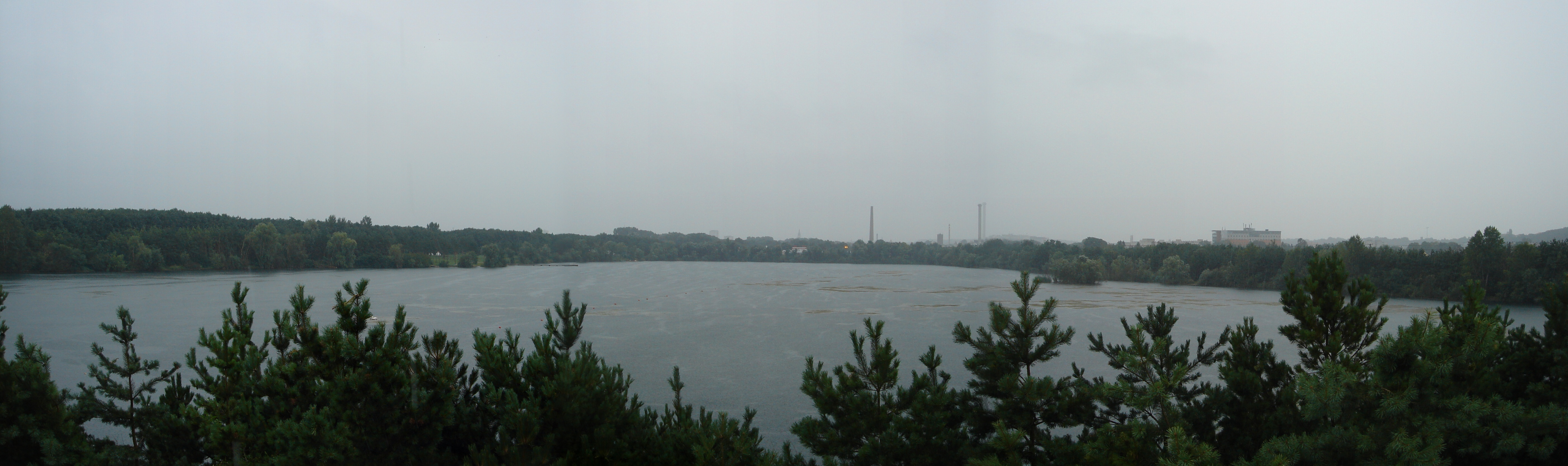 Panorama großer Viehofner See vom Aussichtsturm aus gesehen